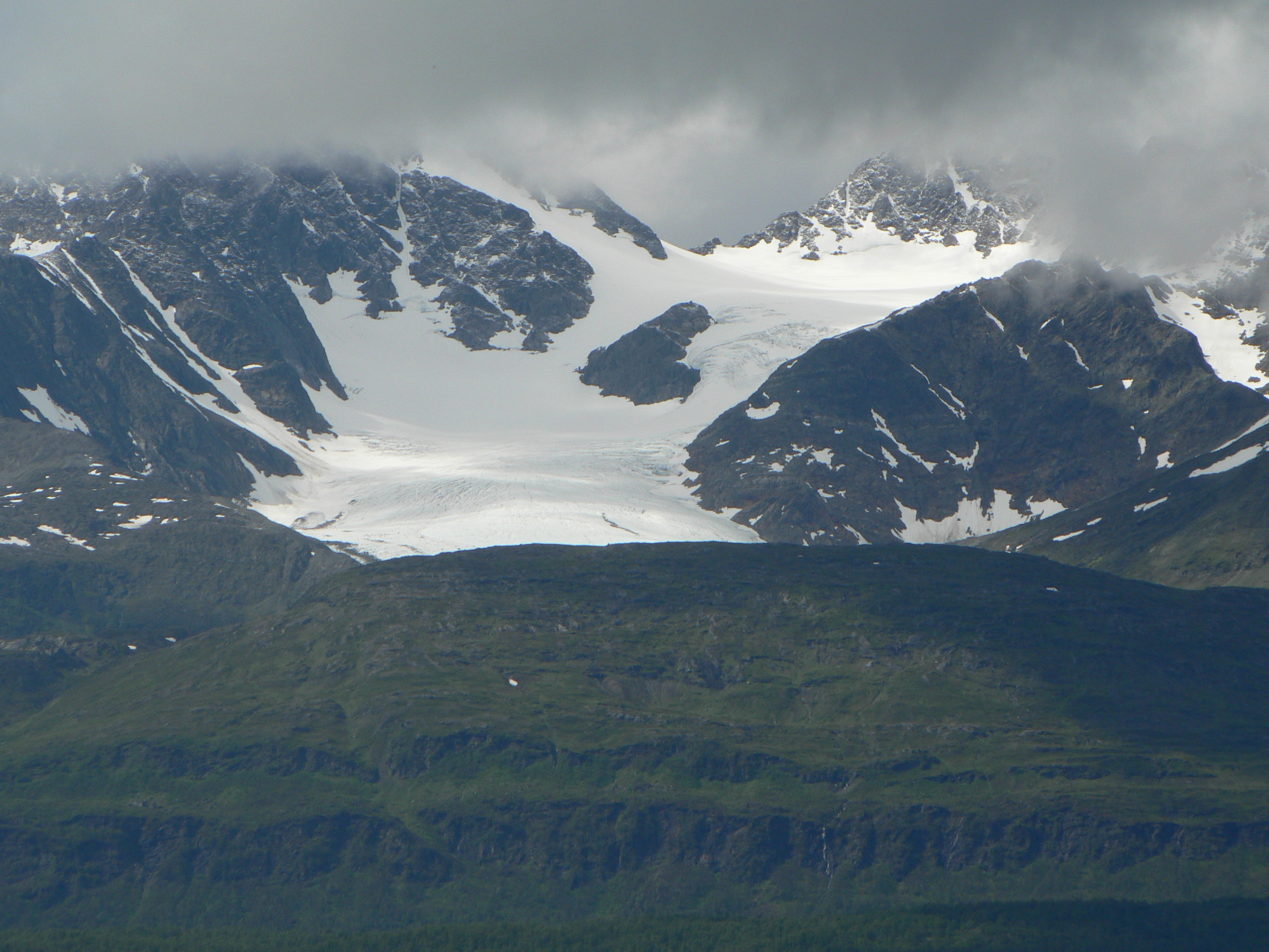 Lyngsalpan